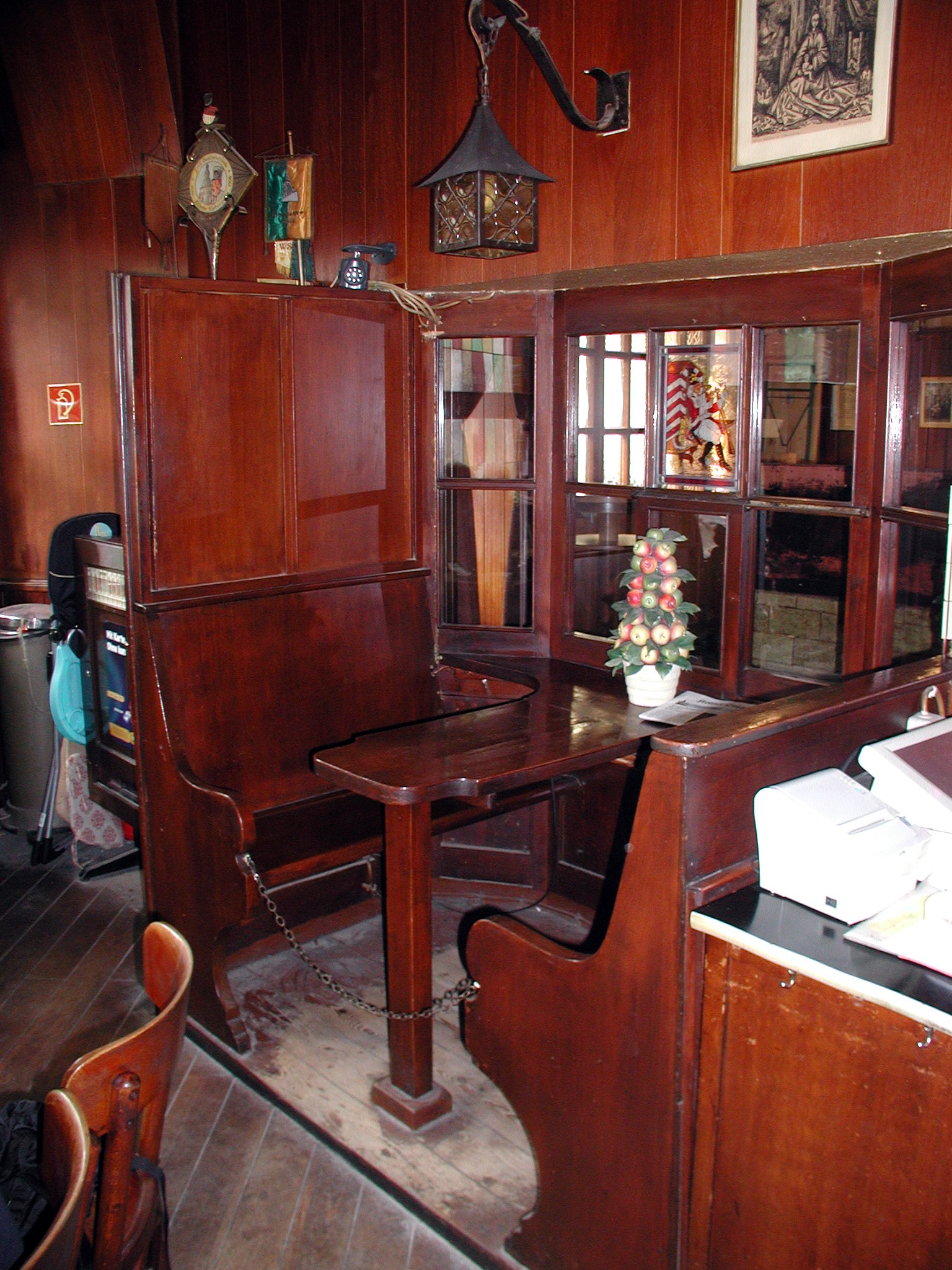 Thekenschaaf-Schreckenskammer-Kölm